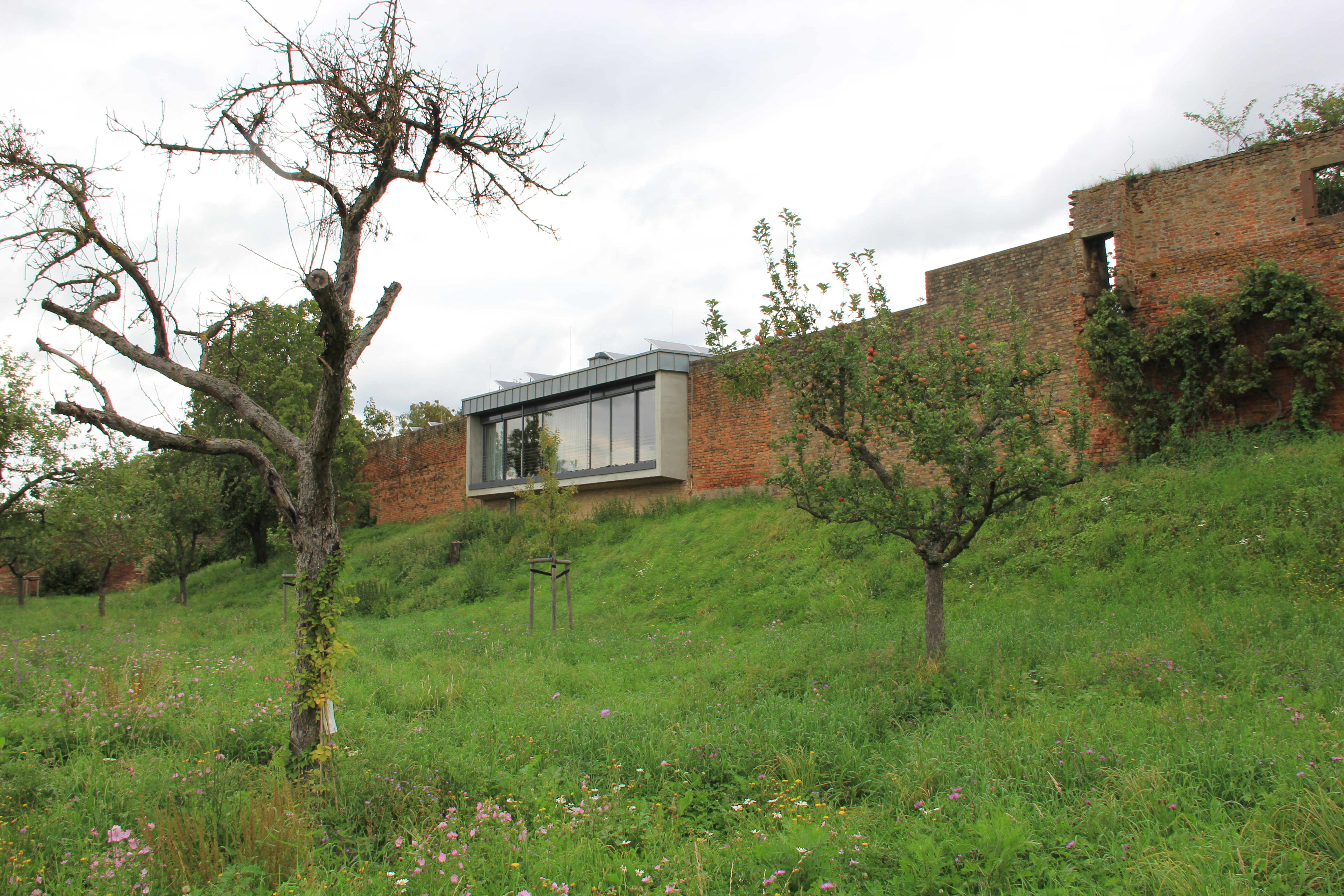 Zülpich, Landesgartenschau 2014 (Park am Wallgraben); Streuobstwiese mit Blick auf die alte Stadtmauer.